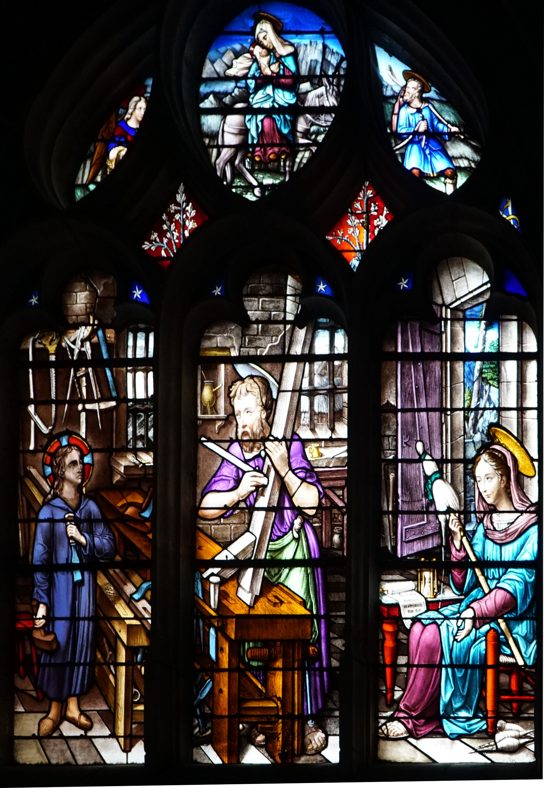 de la basilique de chaumont.